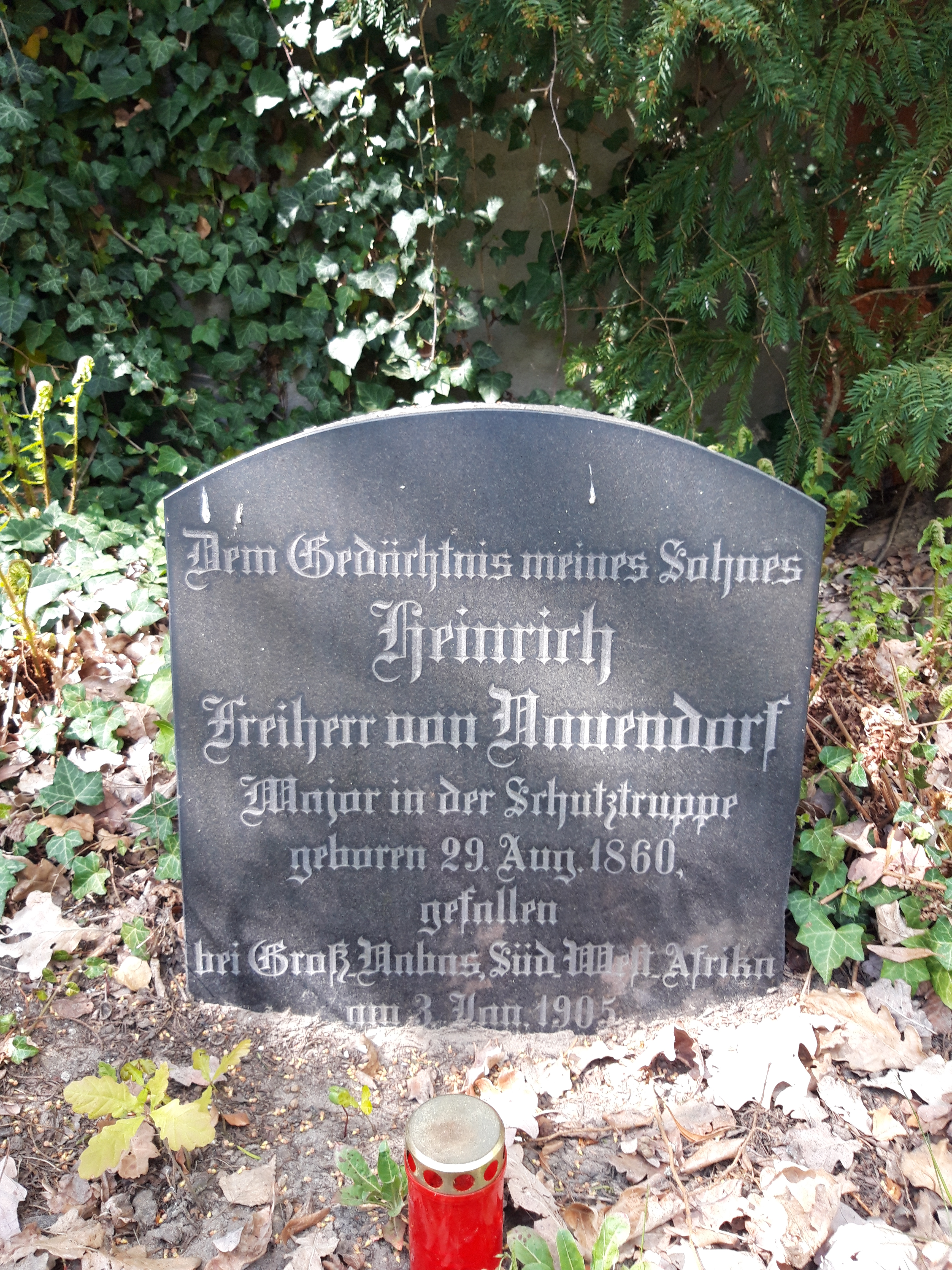 Gedenkstein für Heinrich von Nauendorf auf dem Neuen Friedhof Potsdam Inschrift: "Dem Gedächtnis meines Sohnes Heinrich Freiherr von Nauendorf Major in der Schutztruppe geboren am 29. Aug. 1860 gefallen bei Groß-Nabas Süd-West-Afrika am 3. Aug. 1905"